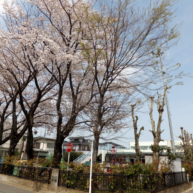 しもほうや保育園 桜の季節に撮影